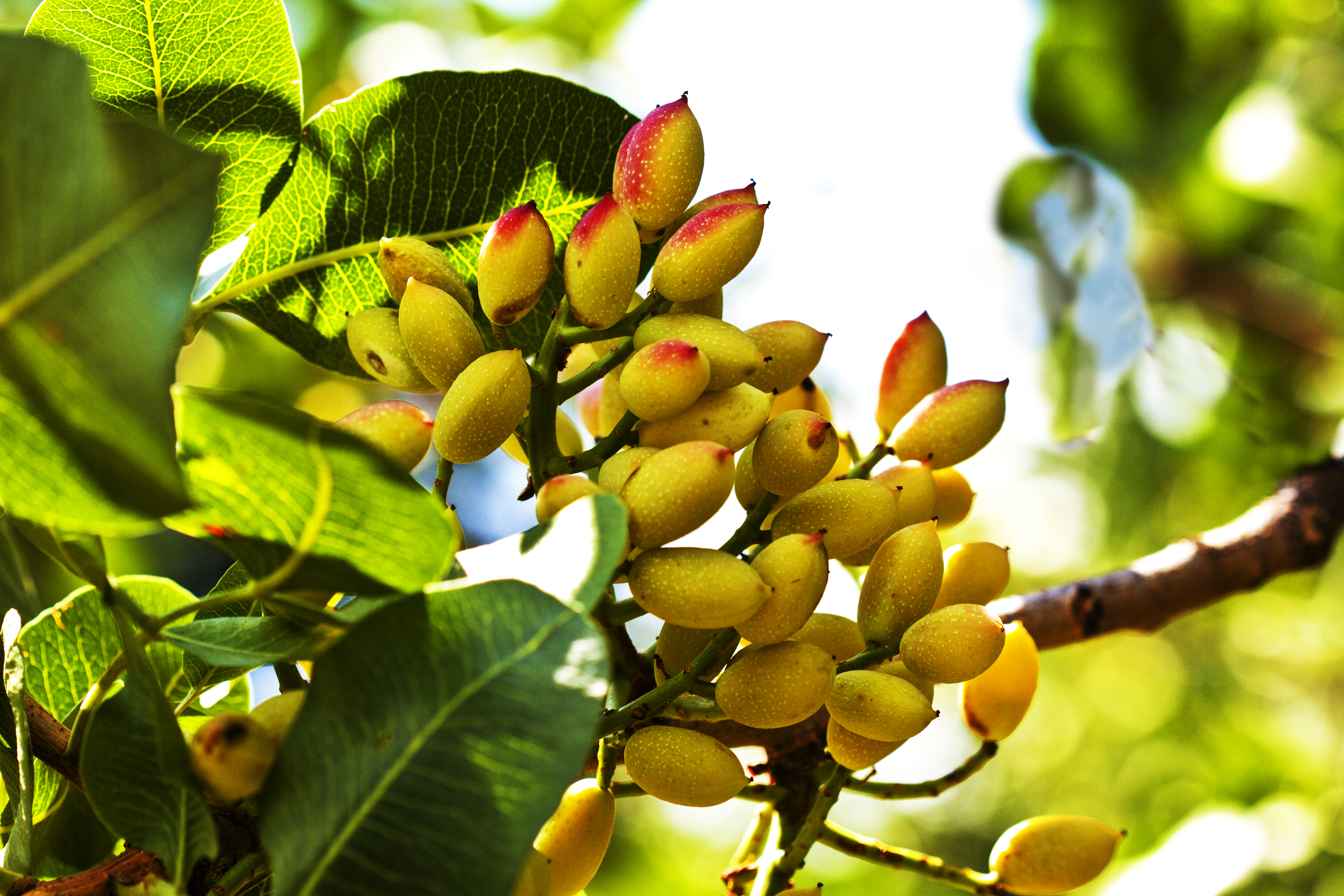 La drupa del pistacchio di Bronte in maturazione